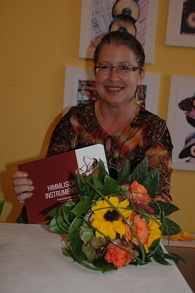 Präsentation Glockenbuch